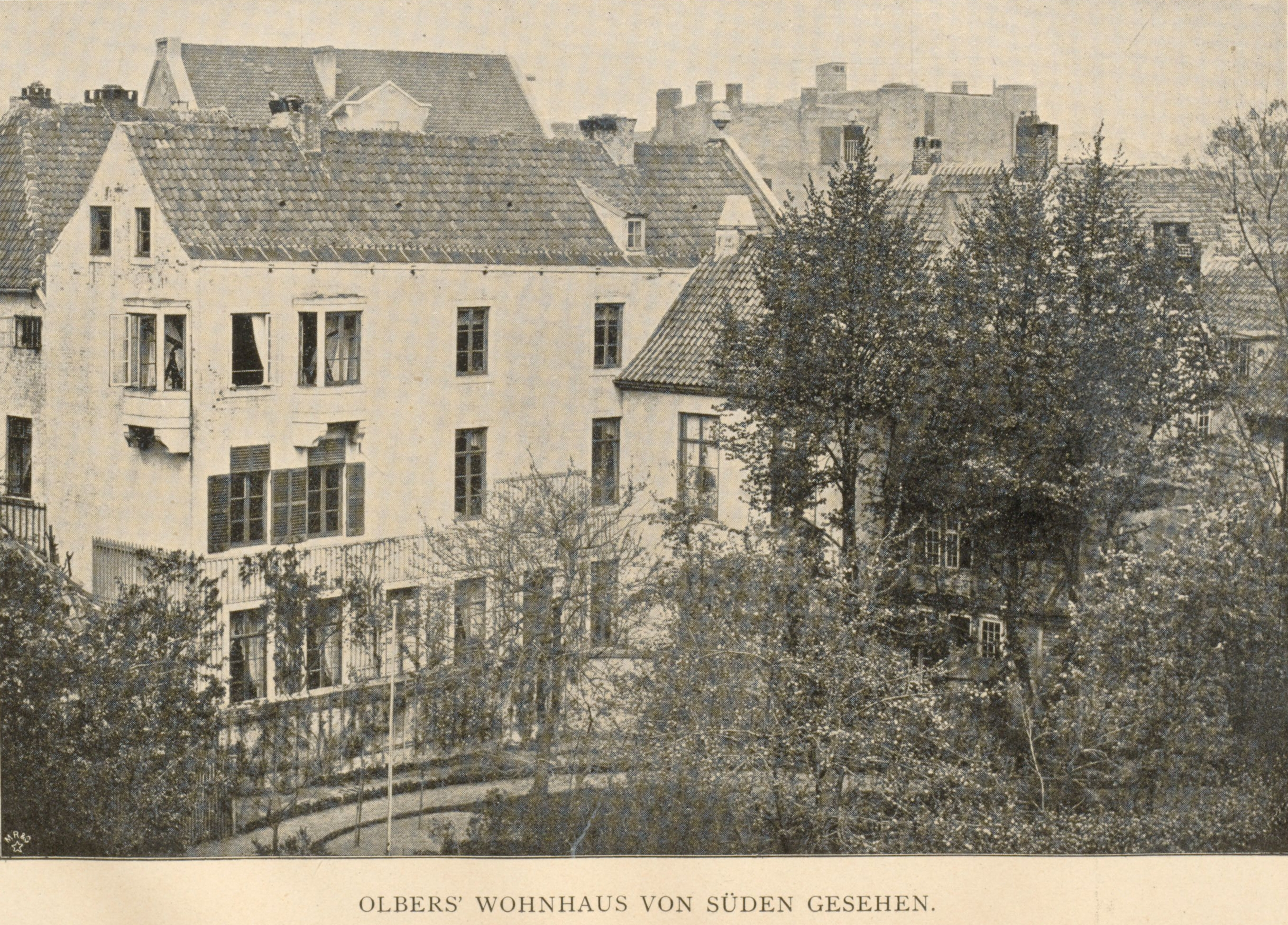 Wohnhaus von Wilhelm Olbers, Bremer Domviertel, Sandstraße 15 (heute 16). Blick von Süden, 1899. Hinter den beiden Erkerfenstern sind die Fernrohre zu sehen, mit denen Olbers seine astronomischen Beobachtungen anstellte.